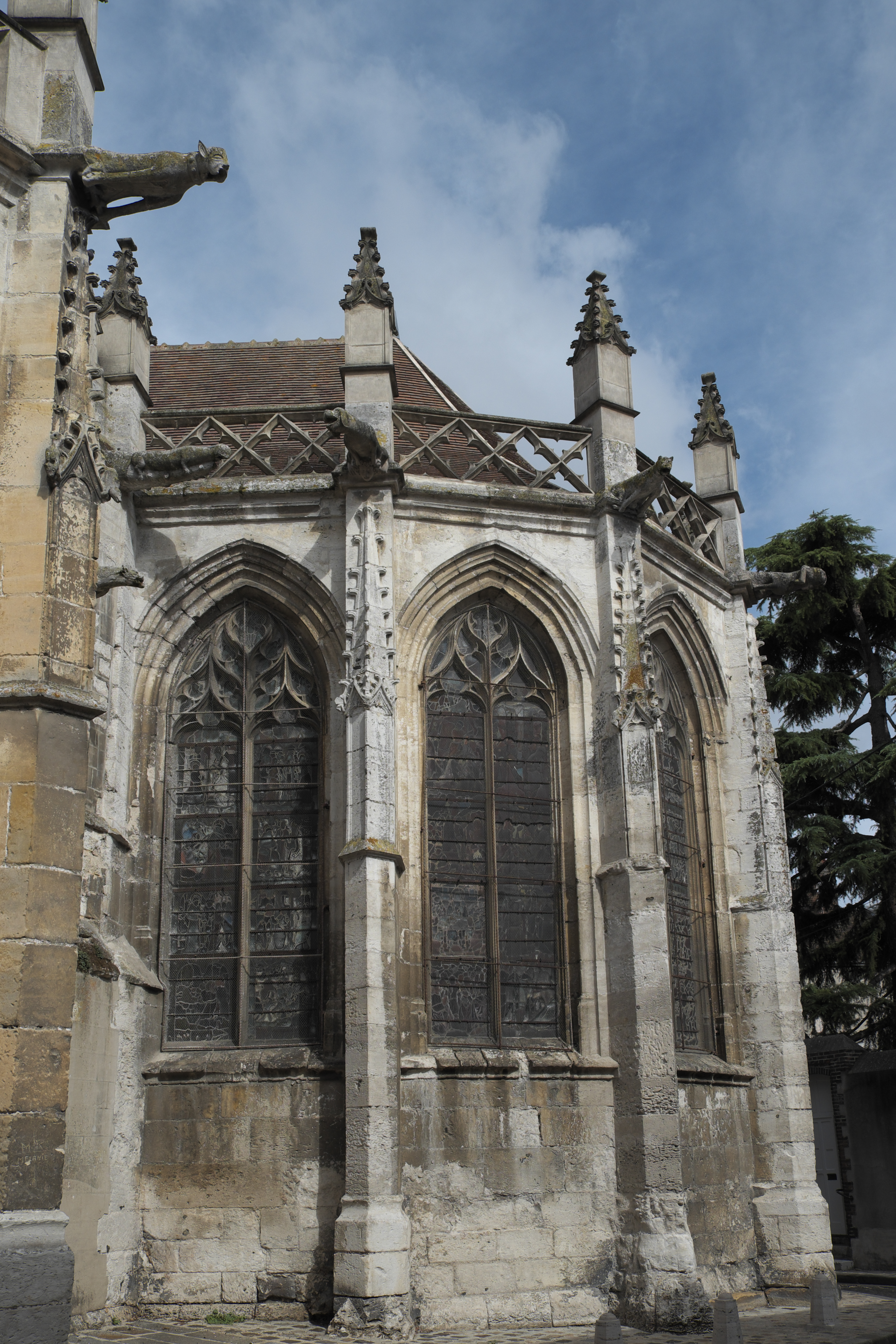 Katholische Kirche Saint-Pierre in Dreux im Département Eure-et-Loir (Centre-Val de Loire/Frankreich), Fialen und Wasserspeier an der Apsis